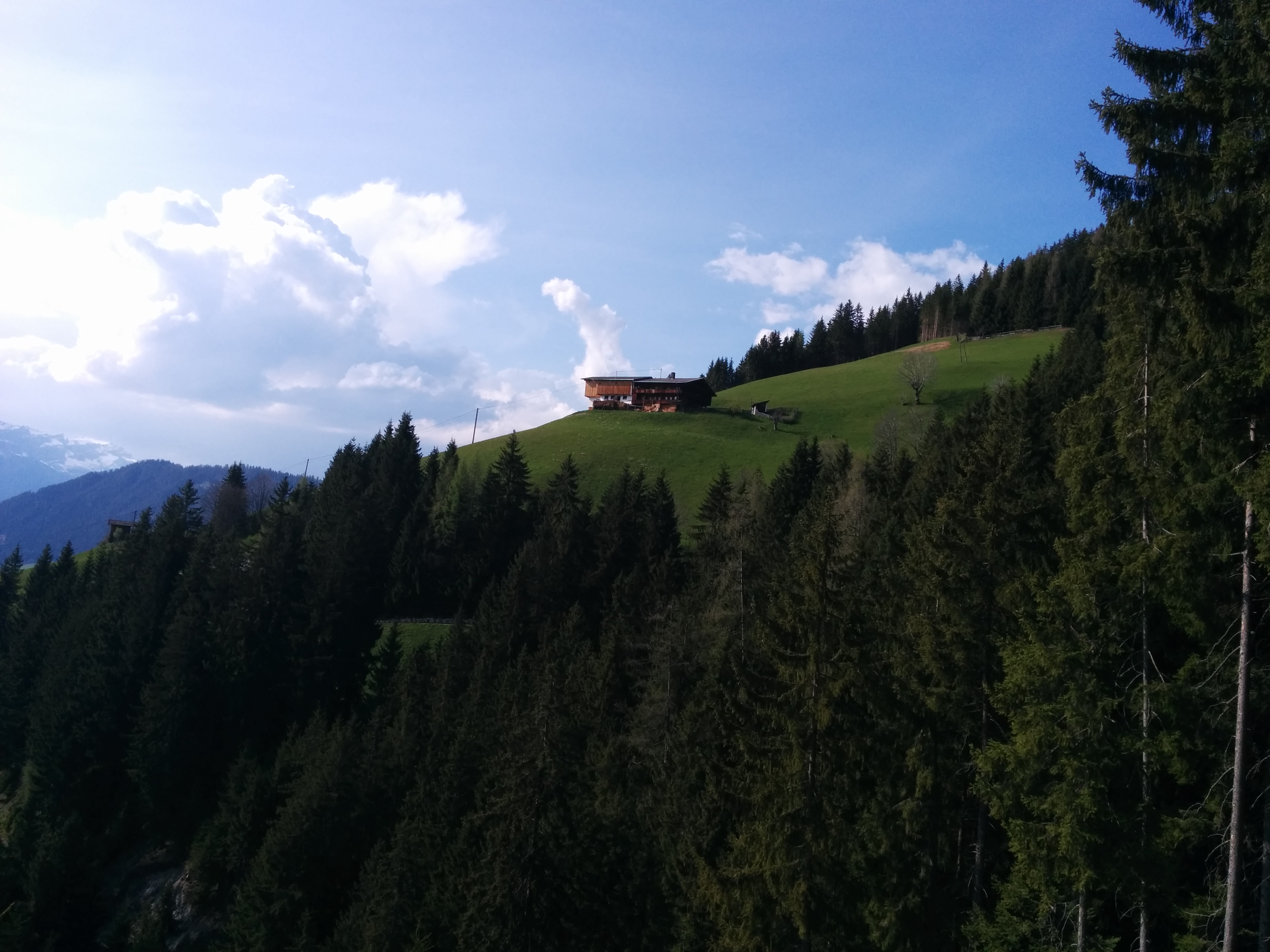 Ein typischer Bergbauernhof in Alpbach - Tirol